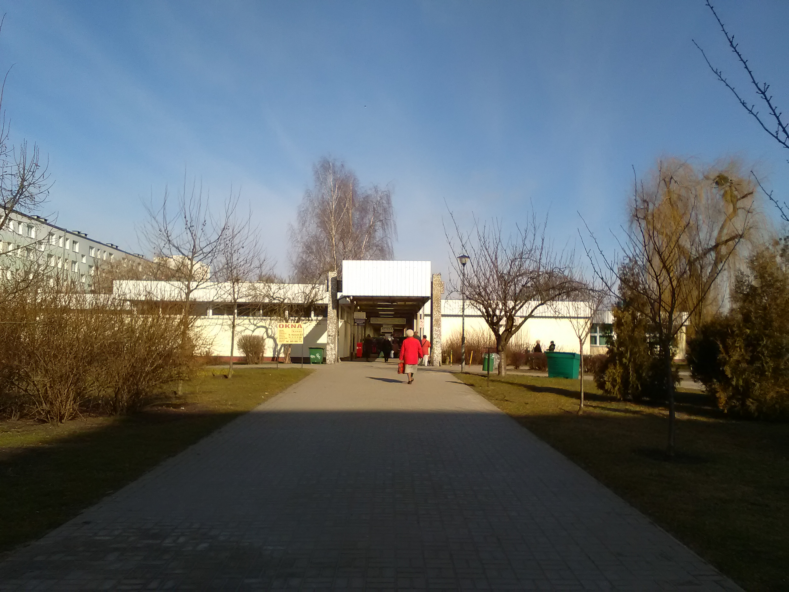 Pasaż handlowy na osiedlu Jagiellońskim w Poznaniu.